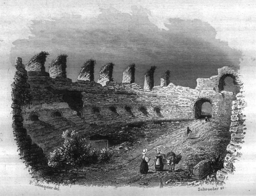 Image en provenance du livre : Eusèbe Girault de Saint-Fargeau, Guide pittoresque du voyageur en France, contenant la statistique et la description complète des quatre-vingt-six départements, orné de 740 vignettes et portraits gravés sur acier, de quatre-vingt-six cartes de départements et d'une grande carte routière de la France, par une Société de gens de lettres, de géographes et d'artistes, Paris, F. Didot frères, 1838, 6 volumes in-8° (BNF : 8-L25- 46). Volume III Didot frères, 1838. Route de Paris à Nice traversant les départements de l'Isère, des Hautes-Alpes, des Basses-Alpes et du Var. auteurs dessins : Rauch (ou autre) auteurs gravures : Skelton fils, Schroeder, Bishop (ou autre)